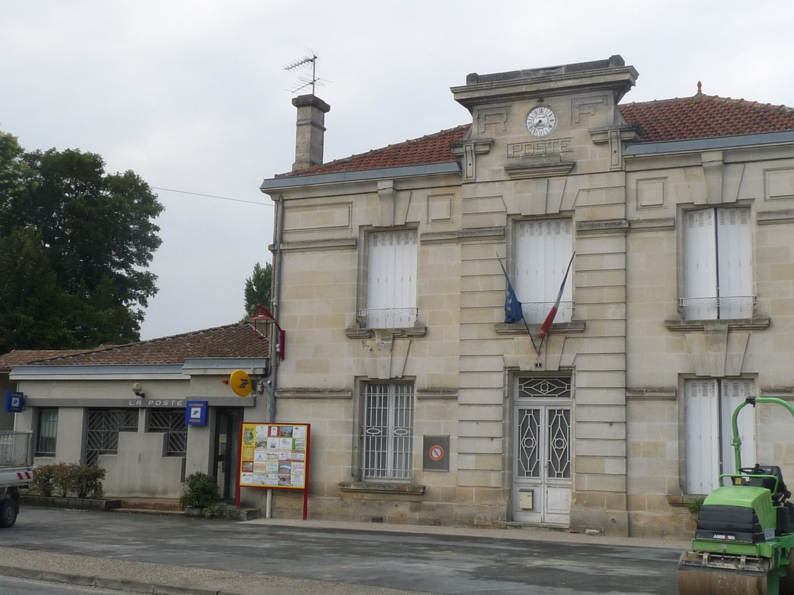 Poste de Reignac,Gironde, France